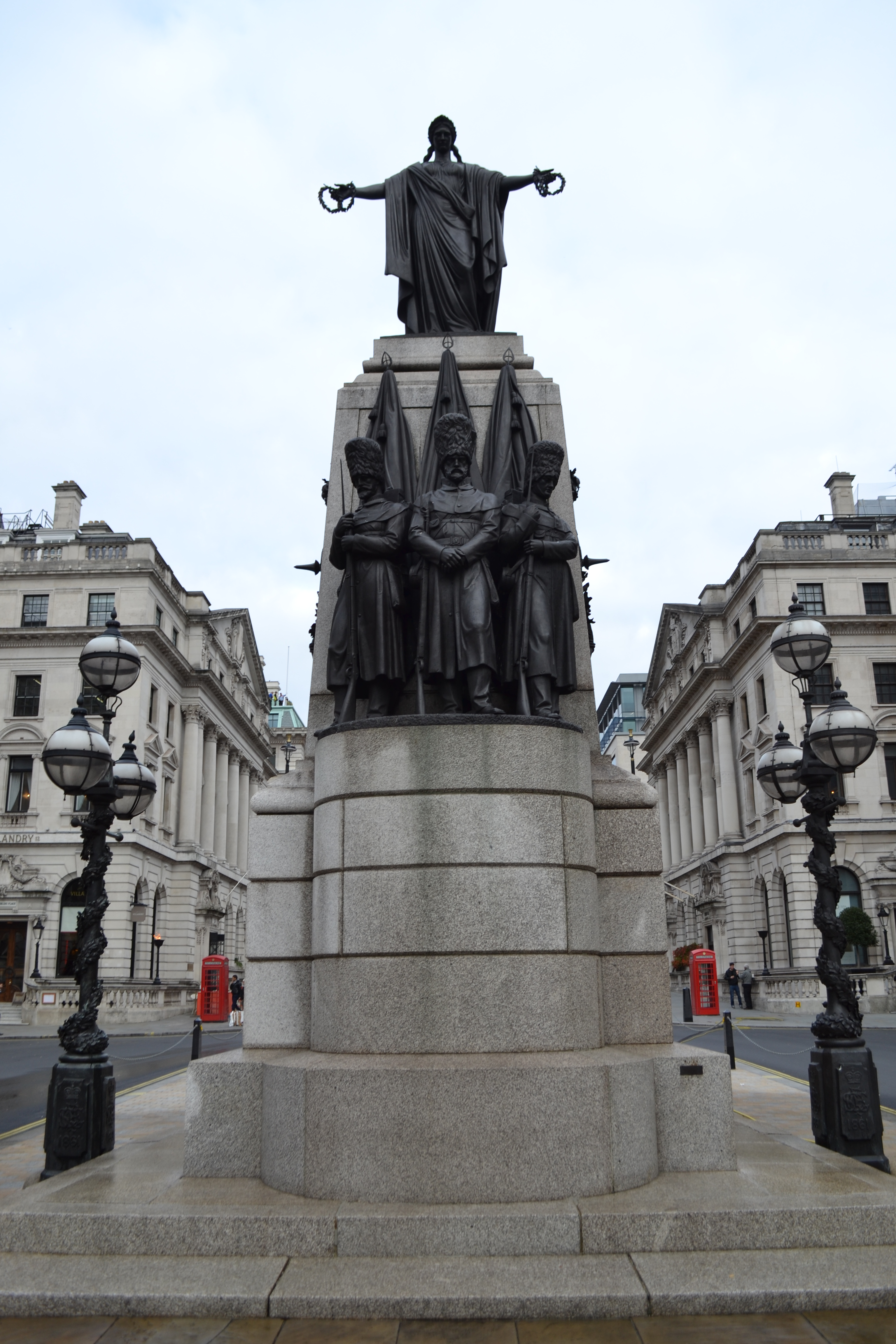 Mémorial de la guerre de Crimée, Waterloo Place, Londres.